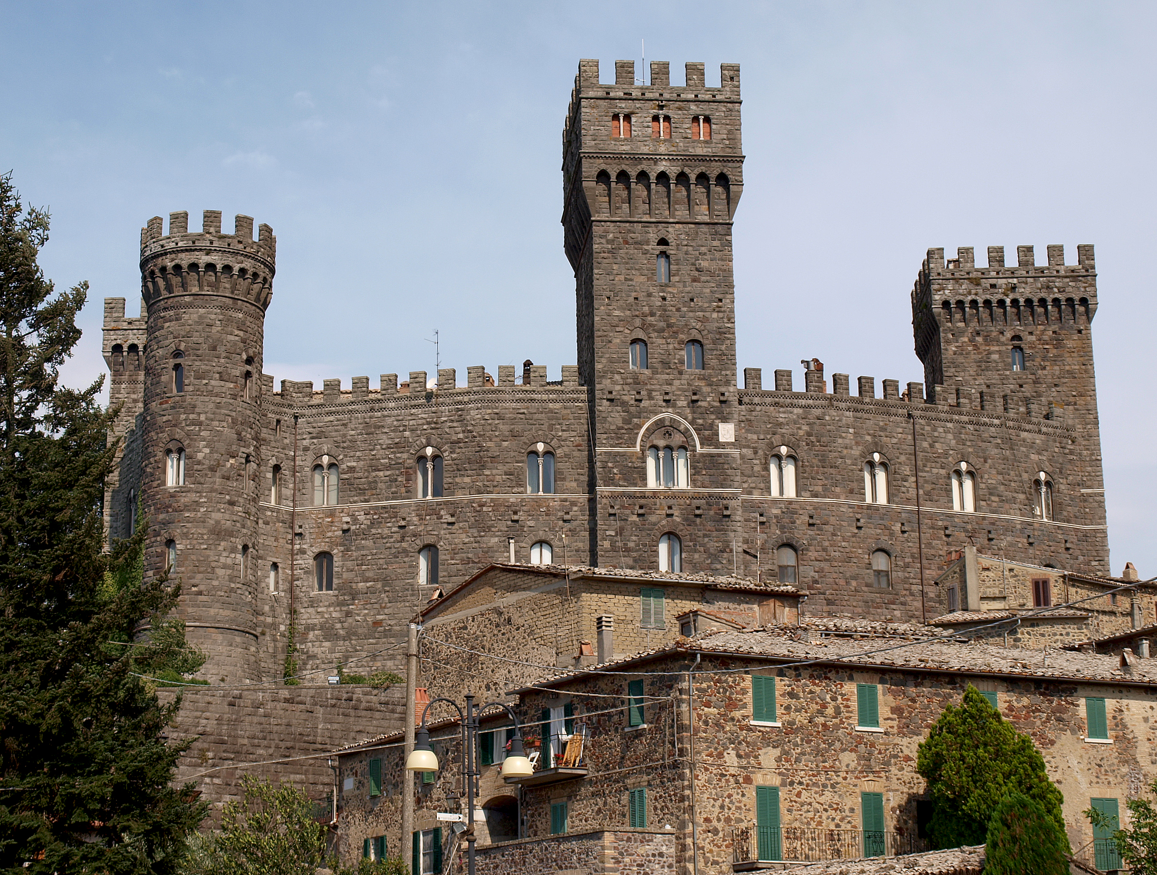 Castello di Torre Alfina